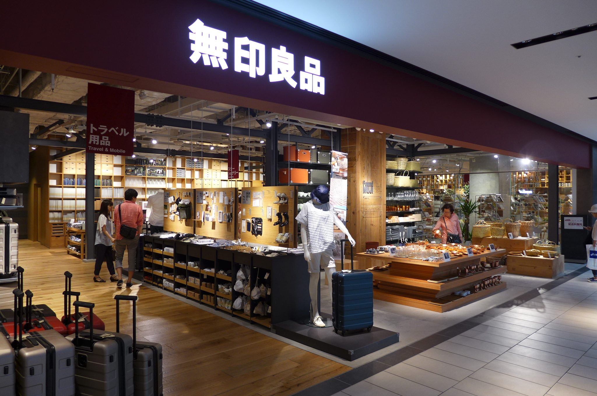 Muji Store in Grand Front Osaka